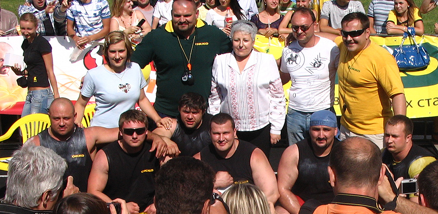 Богатирський турнір у Житомирі. Липень, 2008. Зліва направо, стоять: В. Акулова, В. Вірастюк, В. Шелудченко, ??, О. Гливінський; Сидять:К.Ільїн, М.Мельников, П. Гребеніченко, М. Гавриленко, Р. Бордюжа, В. Герасимов. Переможцями житомирського турніру стали Костянтин Ільїн, Михайло Мельников і Віталій Герасимов